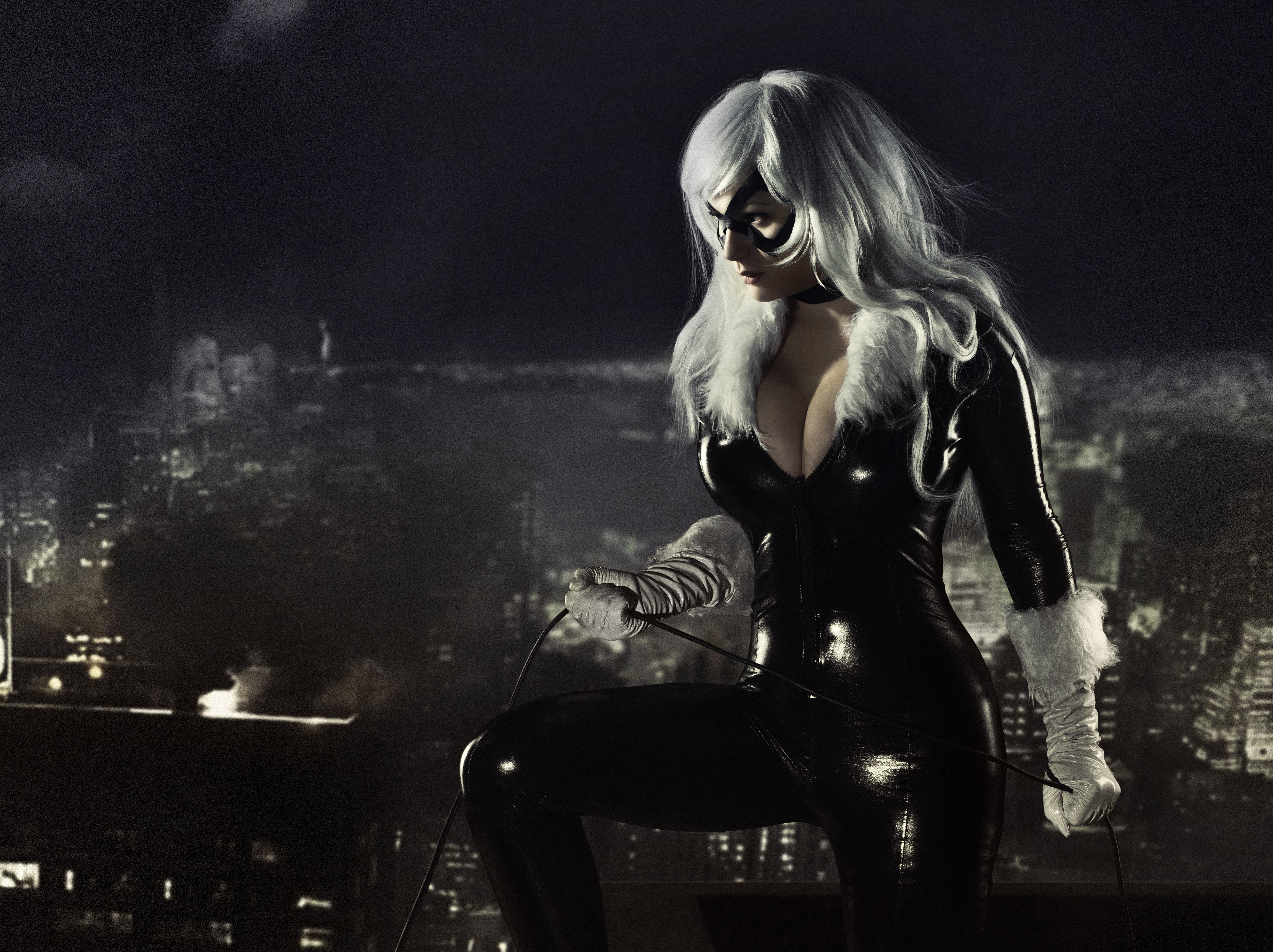 Marvel's Black Cat Cosplay (cropped)